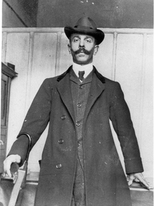 Филипос Кондогурис